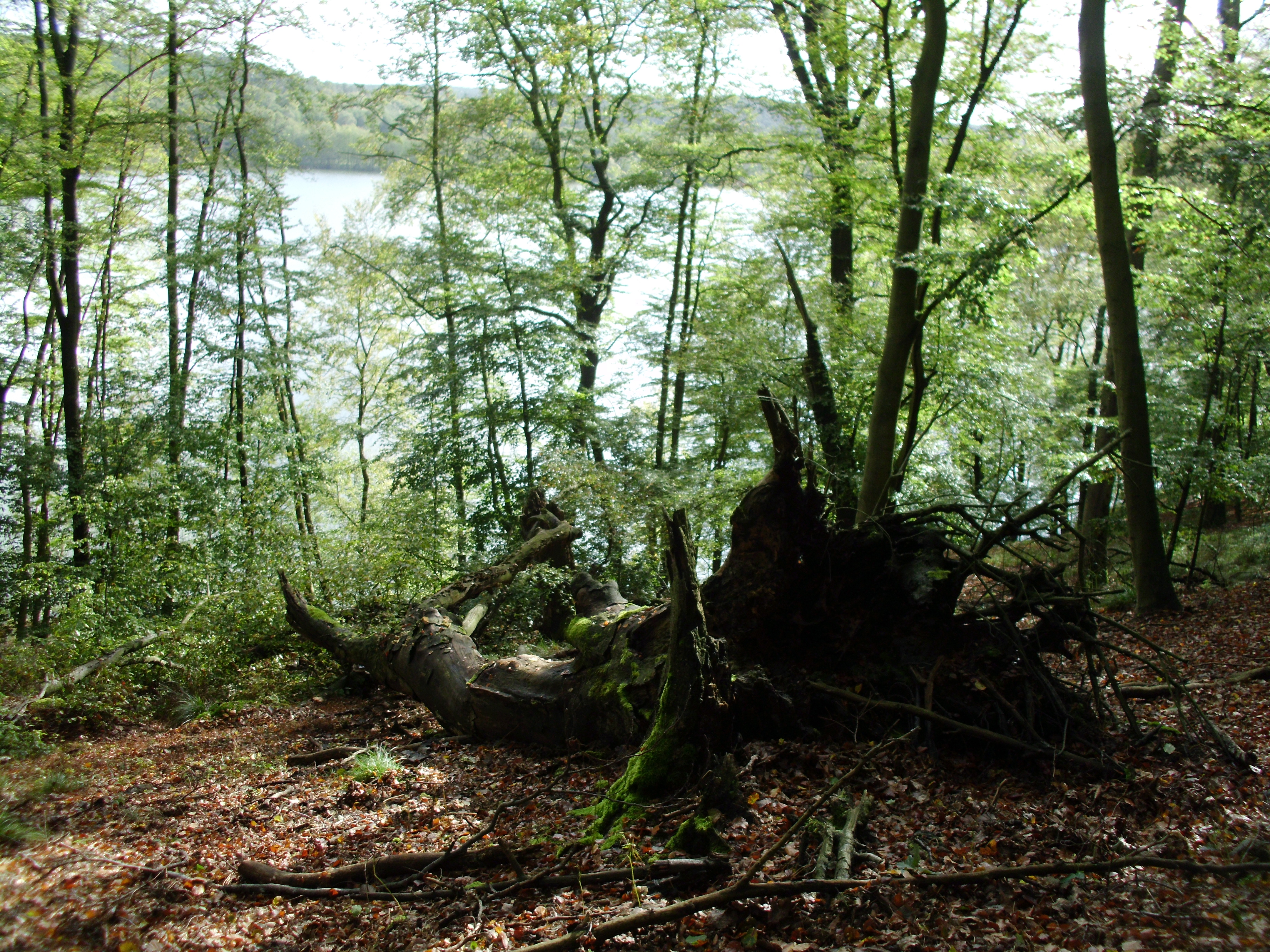 am Ufer des Großen Treppelsees im Naturpark Schlaubetal, Brandenburg